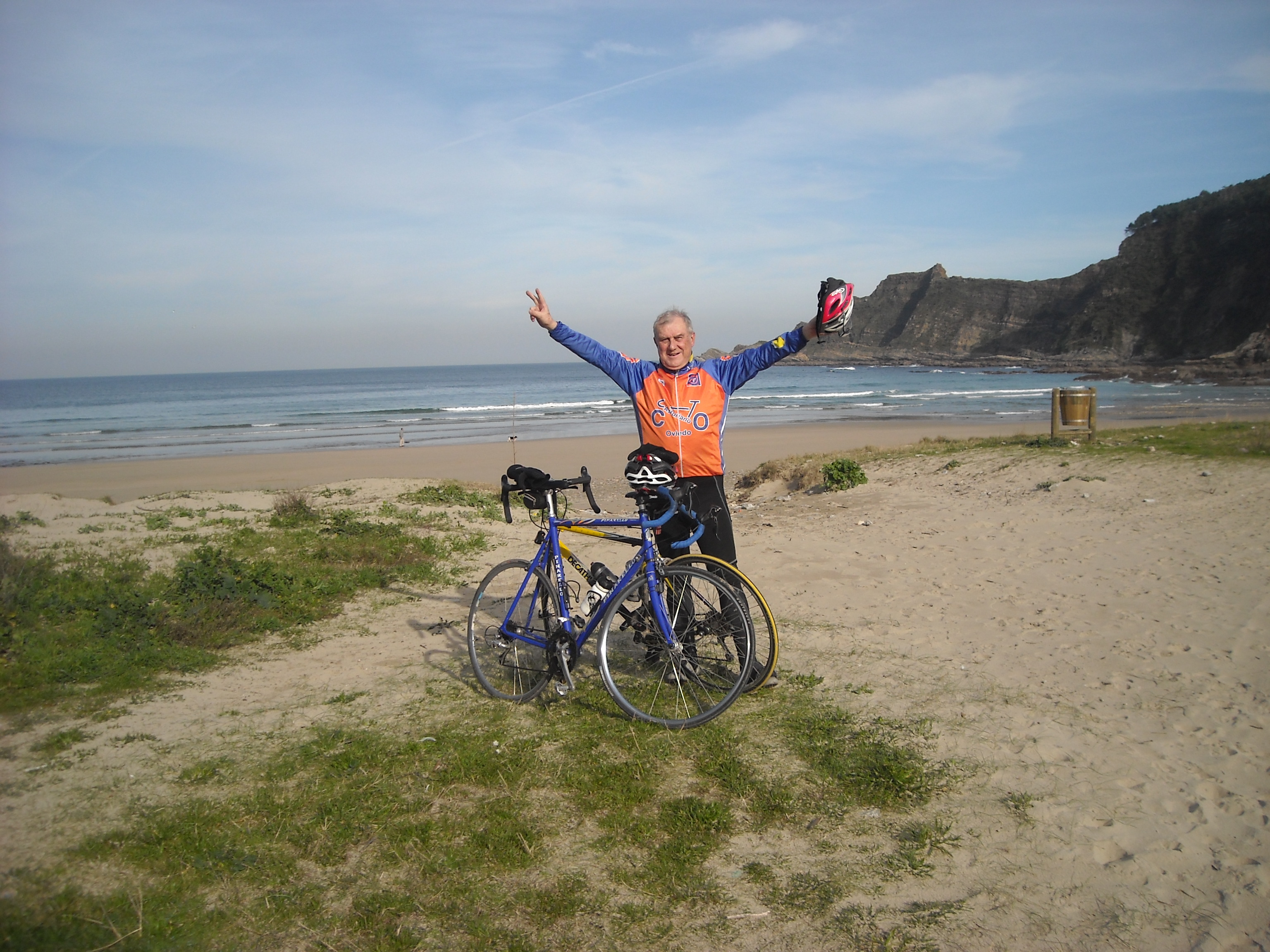 Playa San Pedro de la Ribera-2-junto a Soto de Luiña